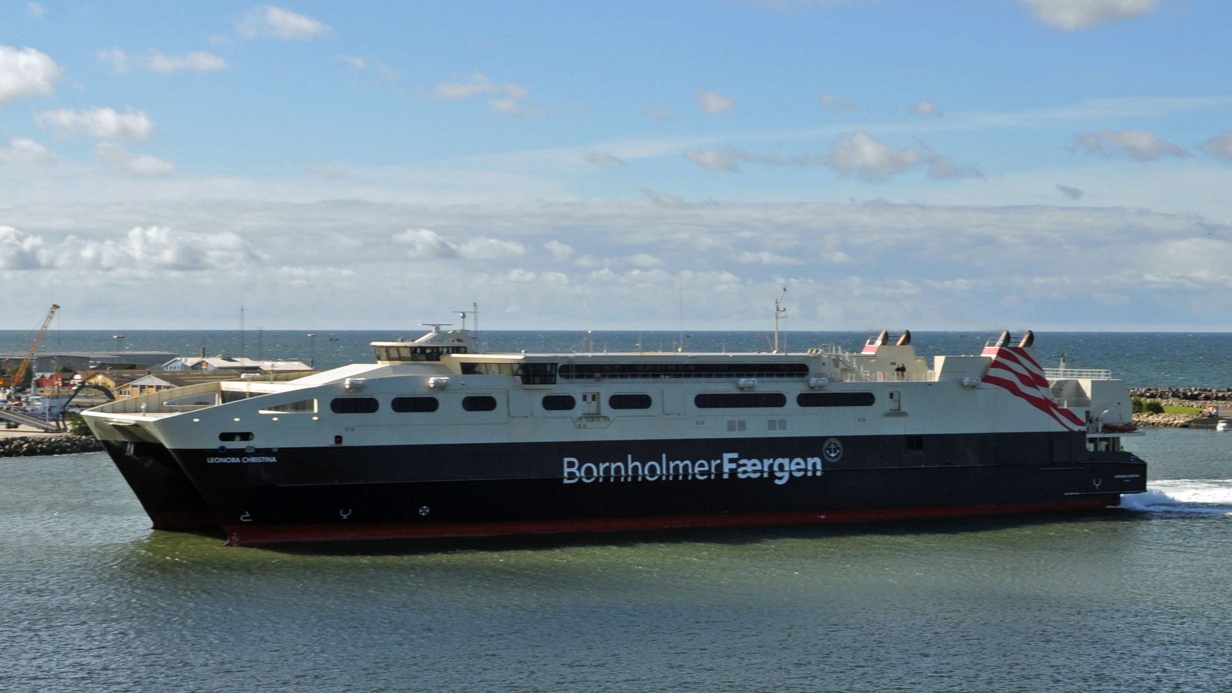 LEONORA CHRISTINA, in Rønne, Bornholm (2012-07-15), by Klugschnacker in Wikipedia (2)